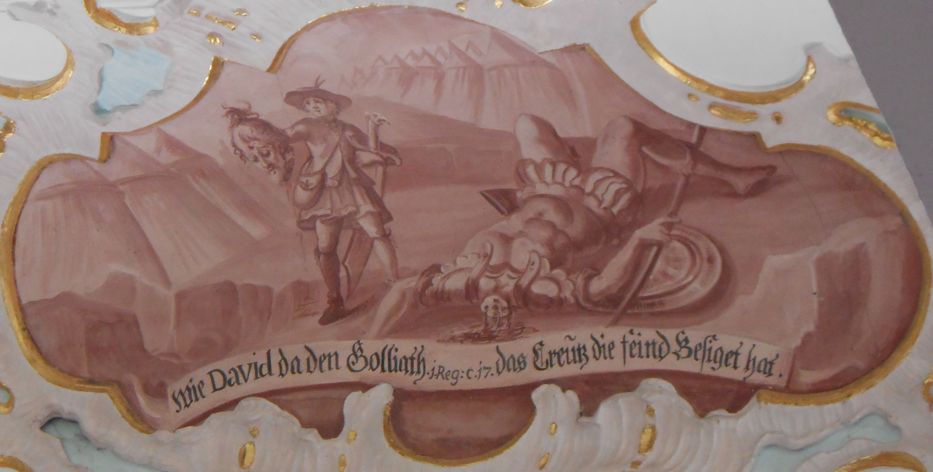 Deckengemälde von Heilig Kreuz (Mindelaltheim)